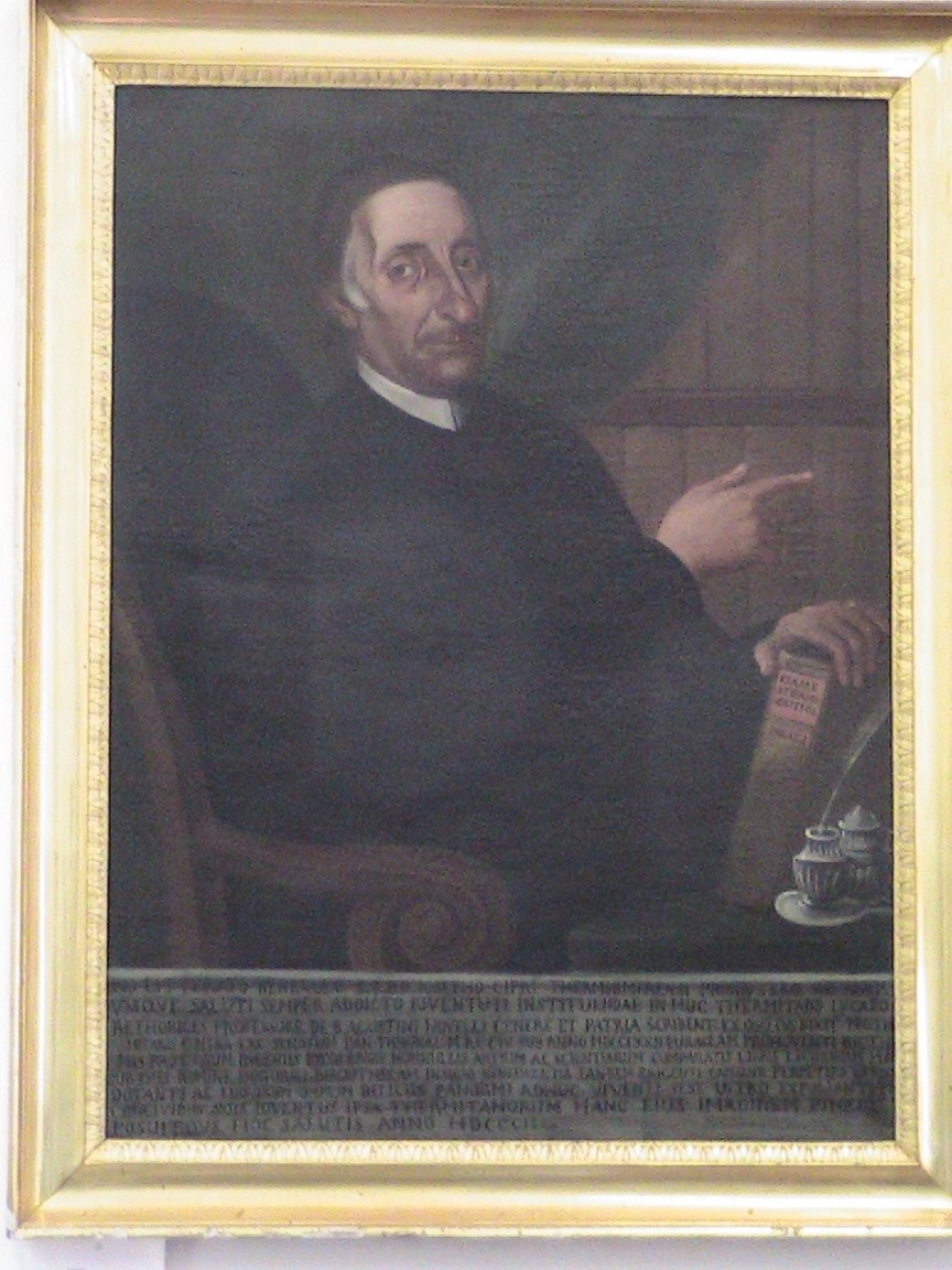 Portrait von Giuseppe Cipri, Termini Imerese 1802 (im Lesesaal der Biblioteca Liciniana in Termini Imerese)